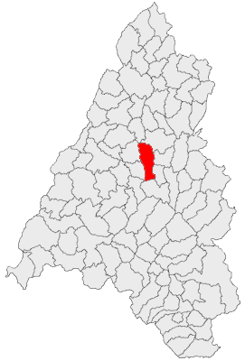 Categorie:Hărţi ale judeţului Bihor